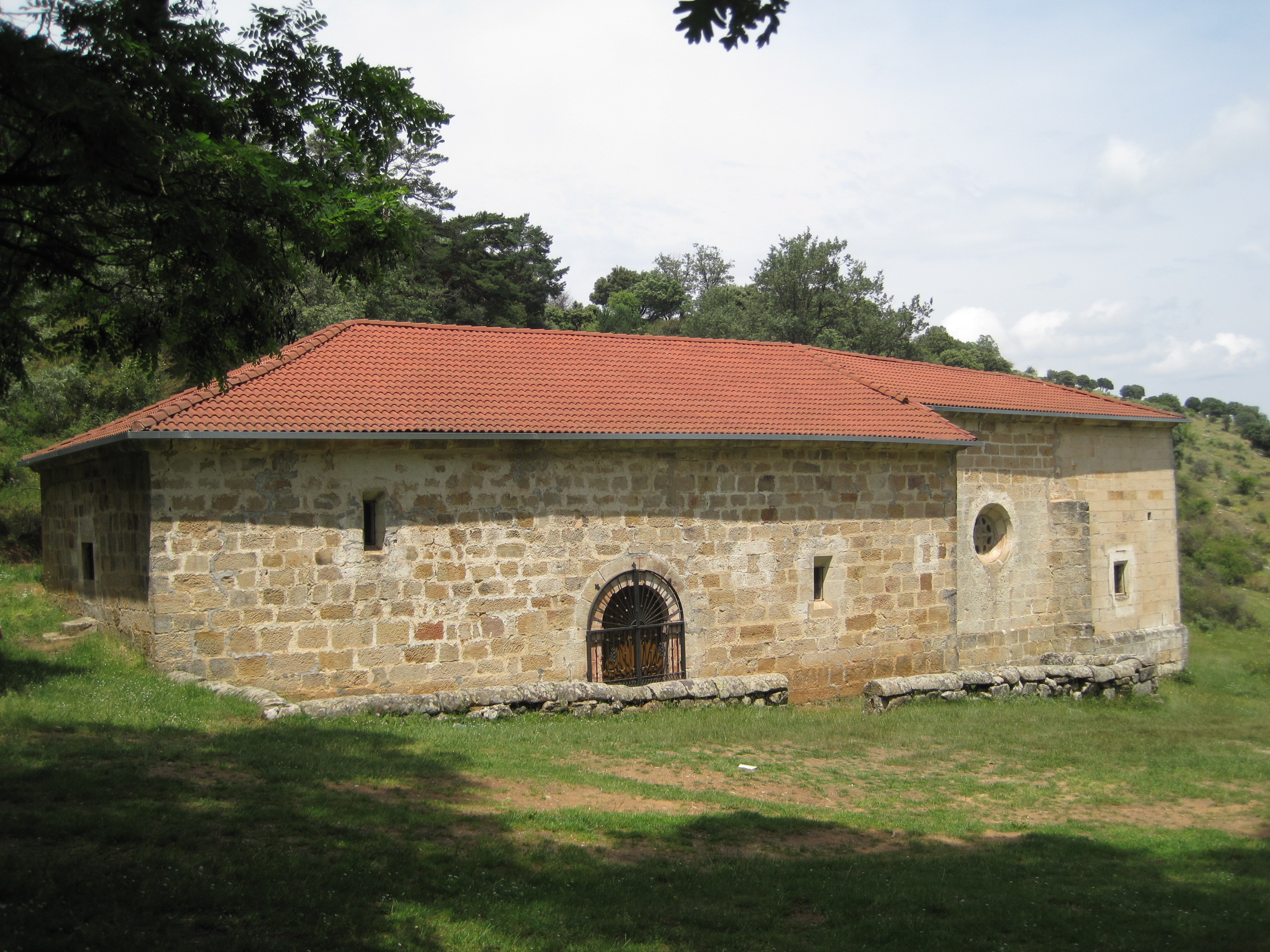 Ermita de la Virgen del Carrascal, en Canicosa de la Sierra (Burgos, España).